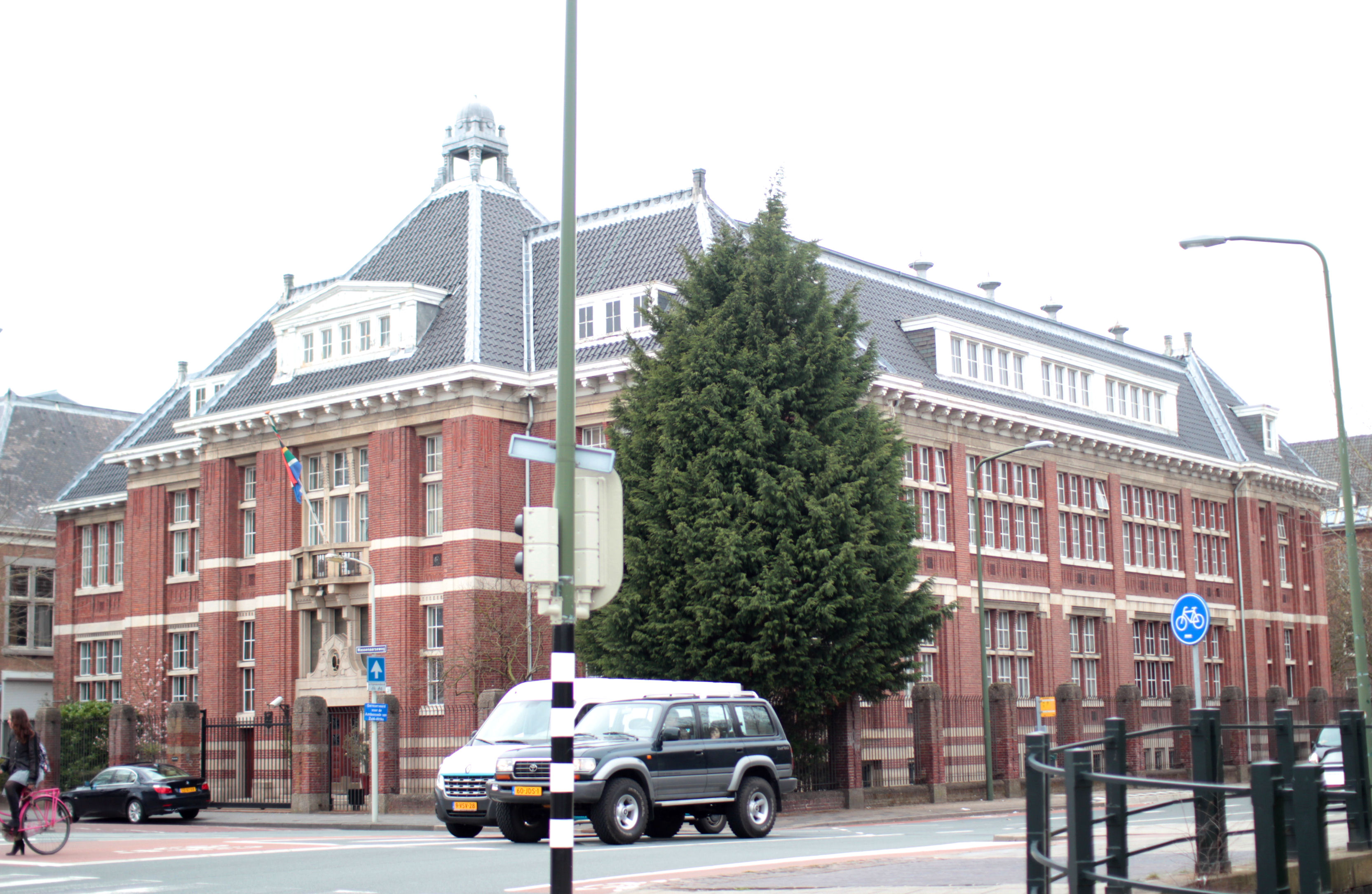 Administratiegebouw van de Nederlandsch Indische Spoorwegmaatschappij aan de Wassenaarseweg 38-40 in Den Haag. April 2013